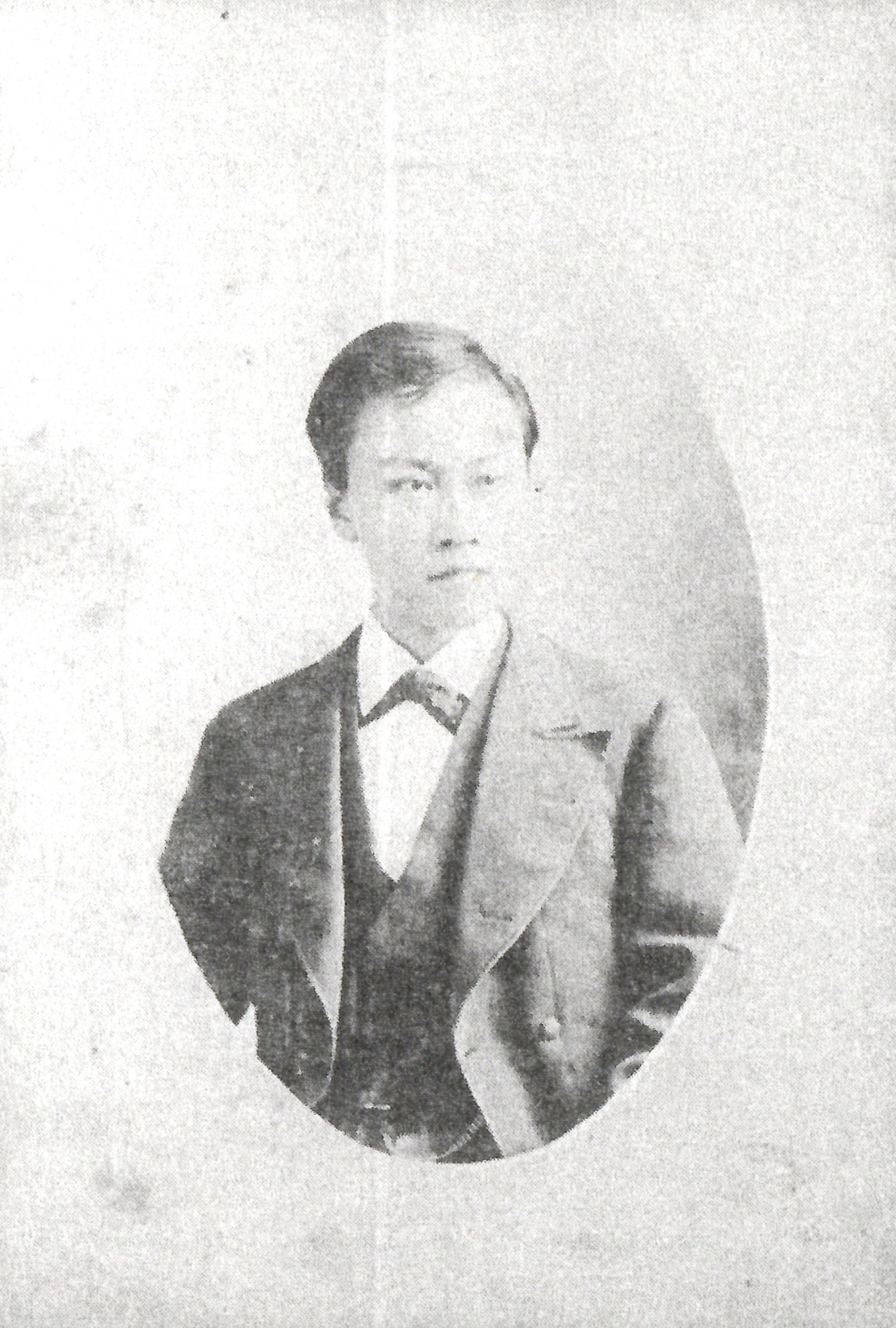 土屋挙直の肖像写真。